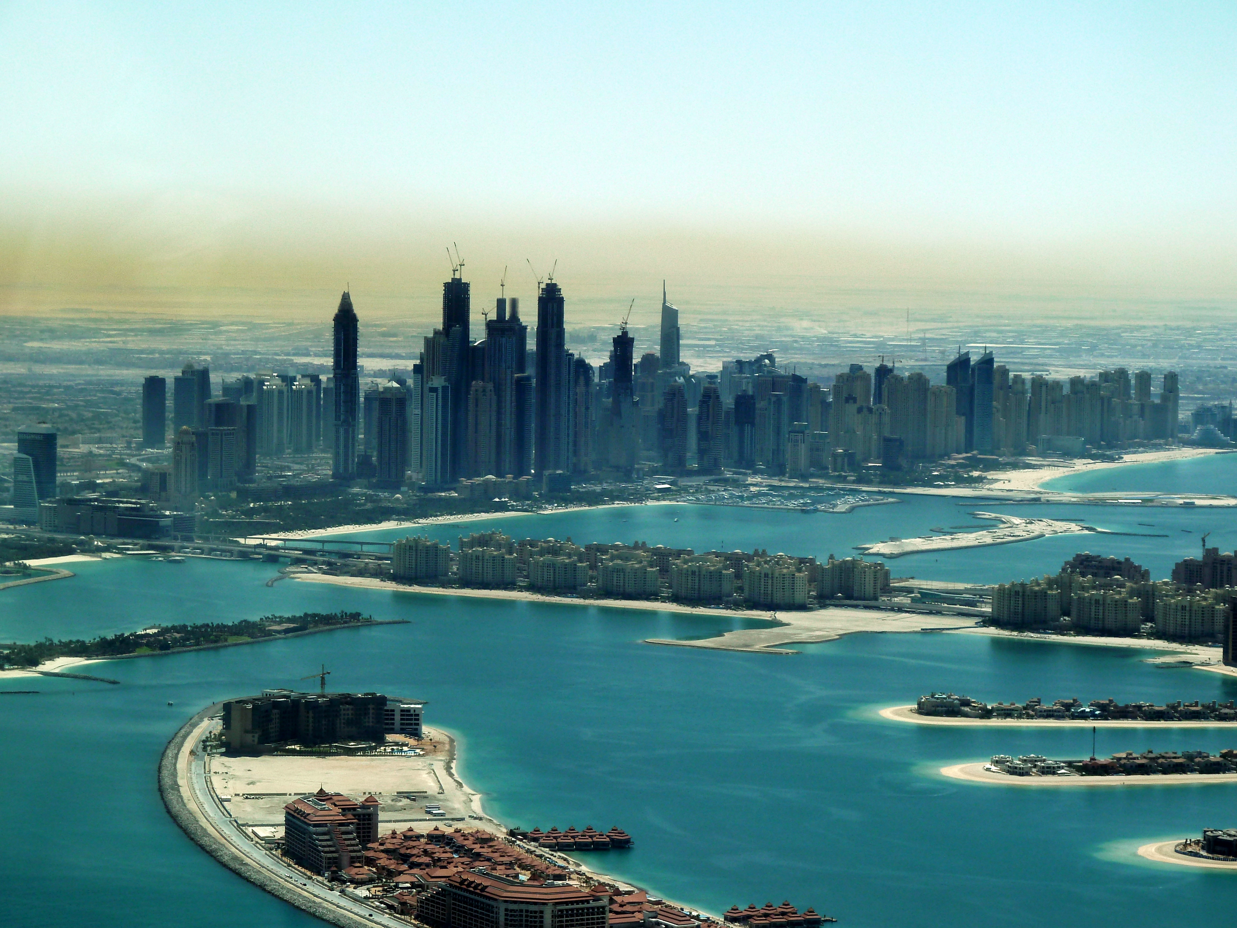 Dubai - Palm Jumeirah und Dubai Marina --- النخلة جميرا ومرسى دبي